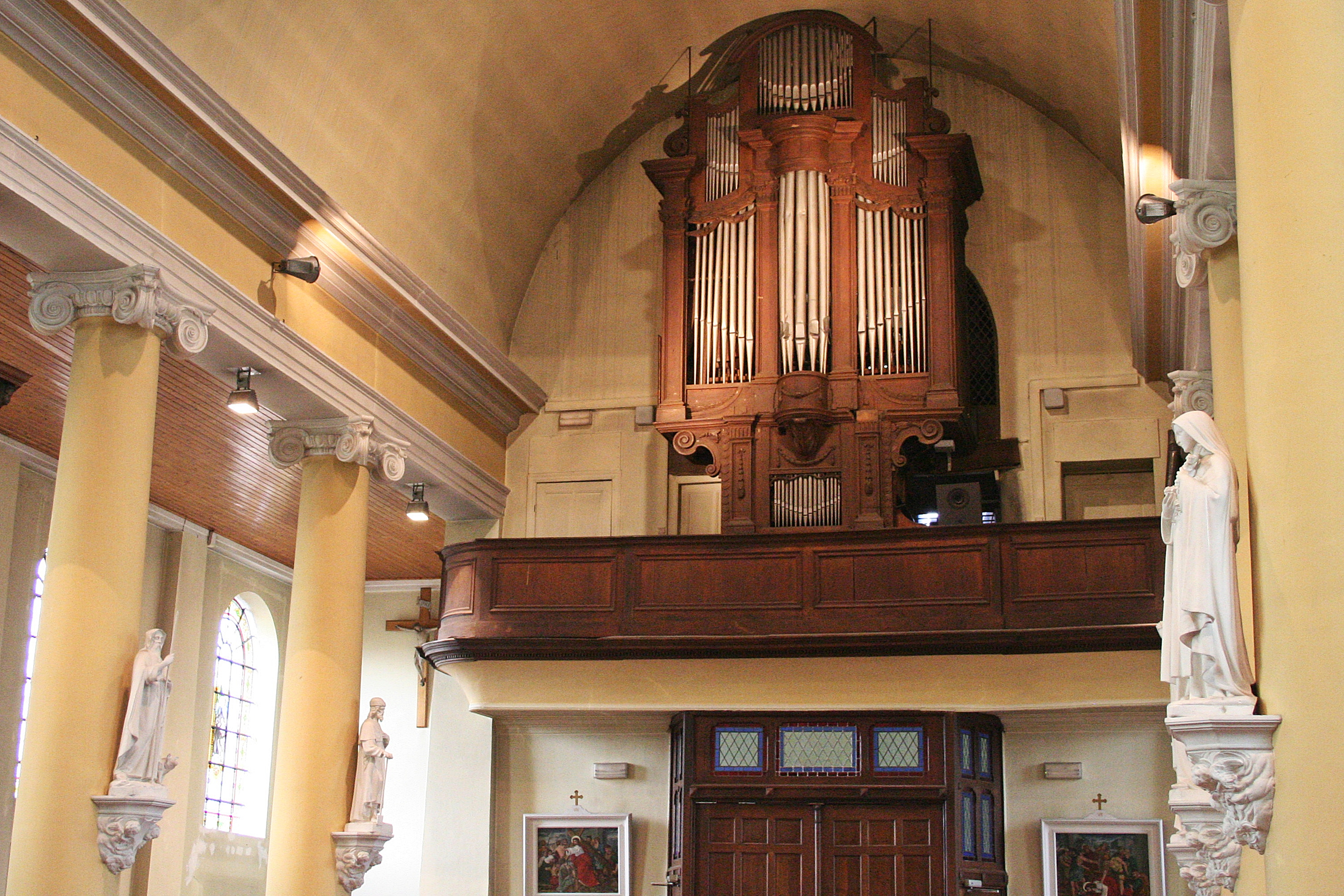 Wolfsdonk - Sint-Antonius Abt Kerk - Doksaal met orgel en tongewelf schip